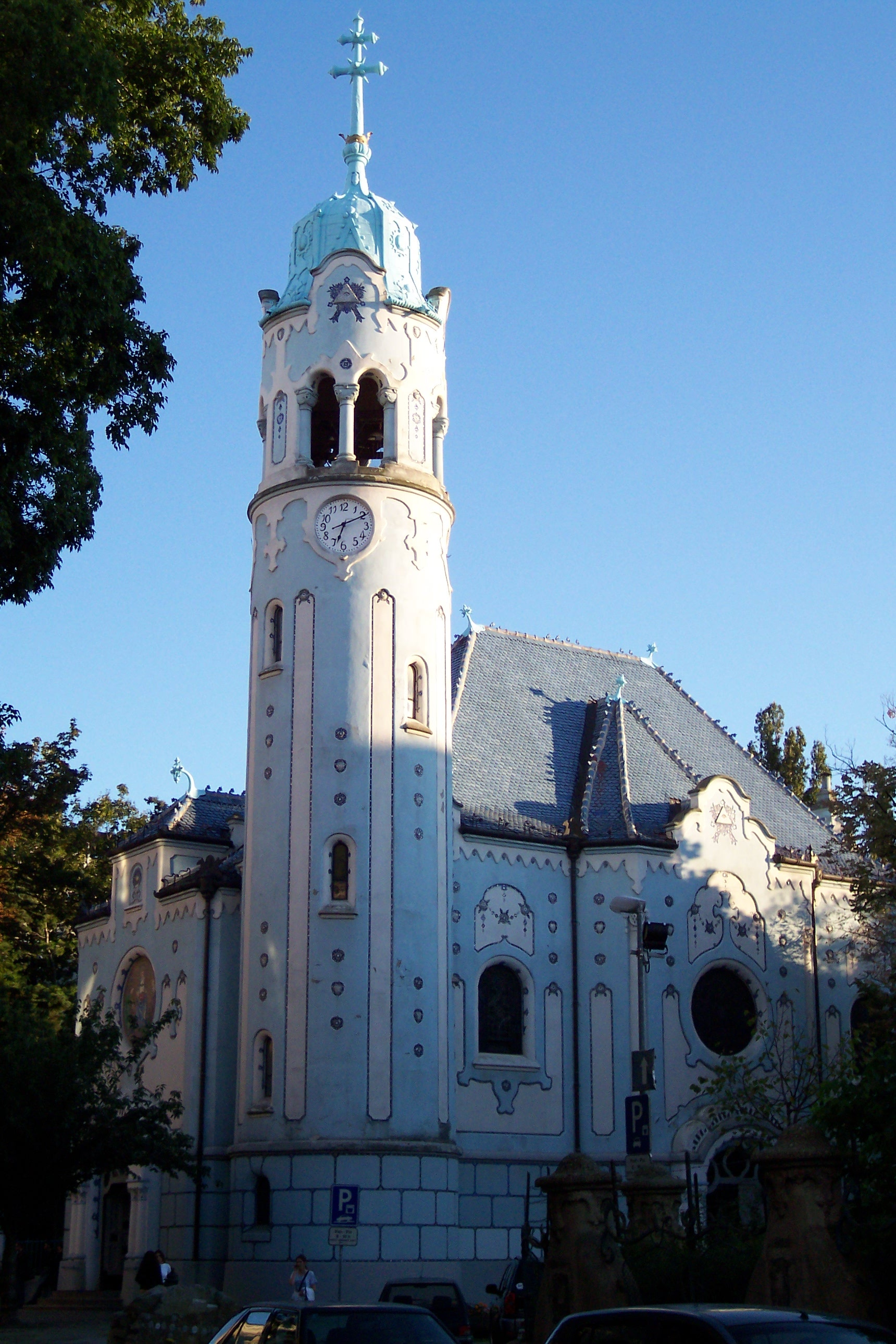 Die Blaue Kirche